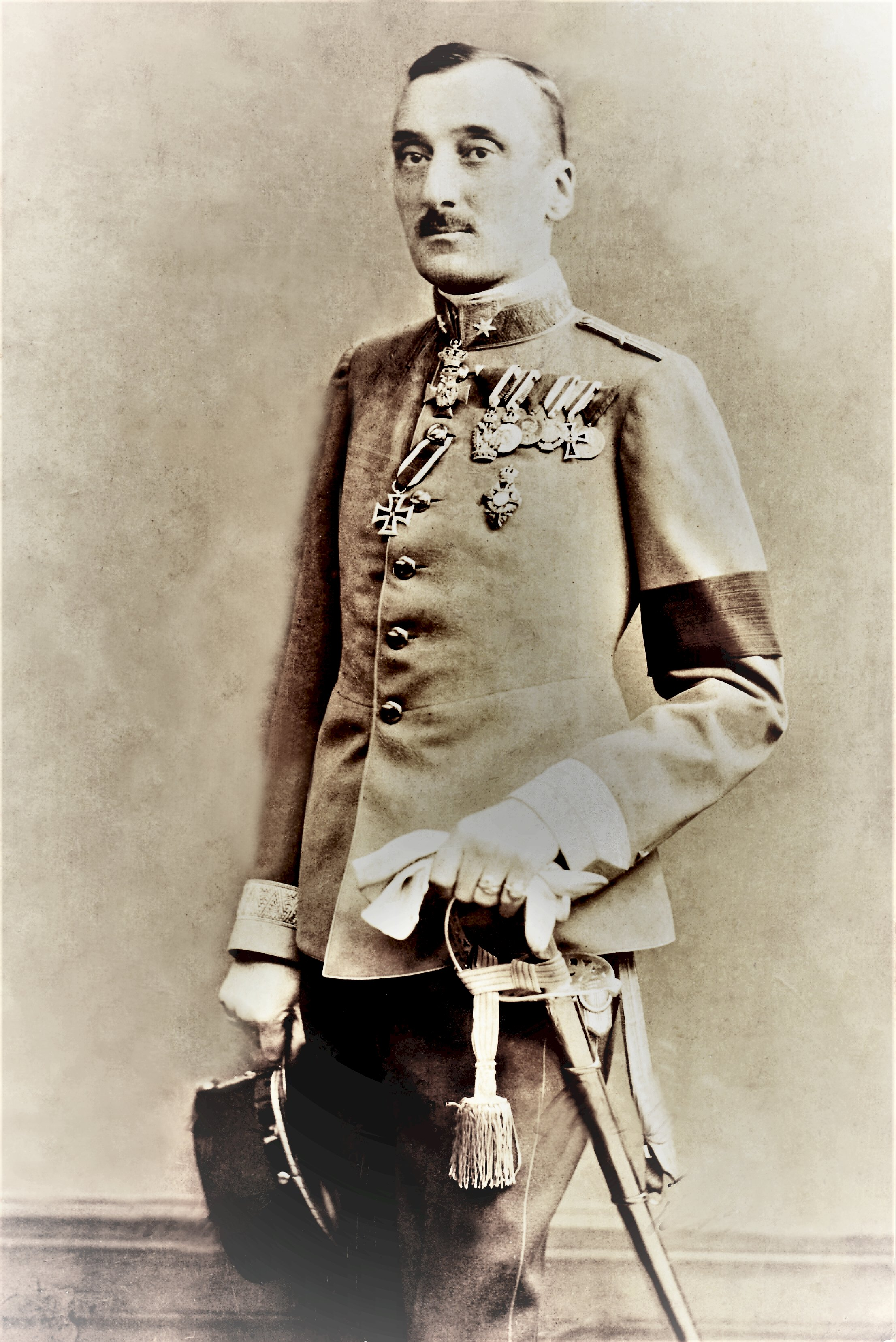 Alexander Graf Wassilko von Serecki in Wien Nov. 1916, kurz vor oder nach der Beerdigung Kaiser Franz Joseph I.